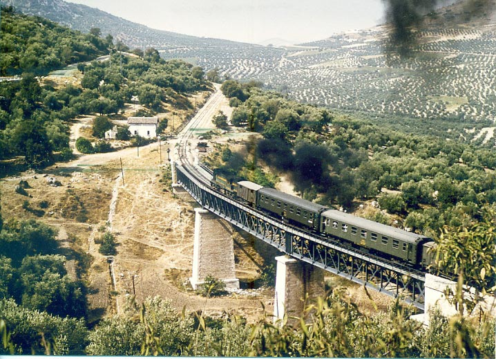 Un servicio Ómnibus atravesando el puente sobre el rio Bailón, en la línea Linares-Puente Genil.